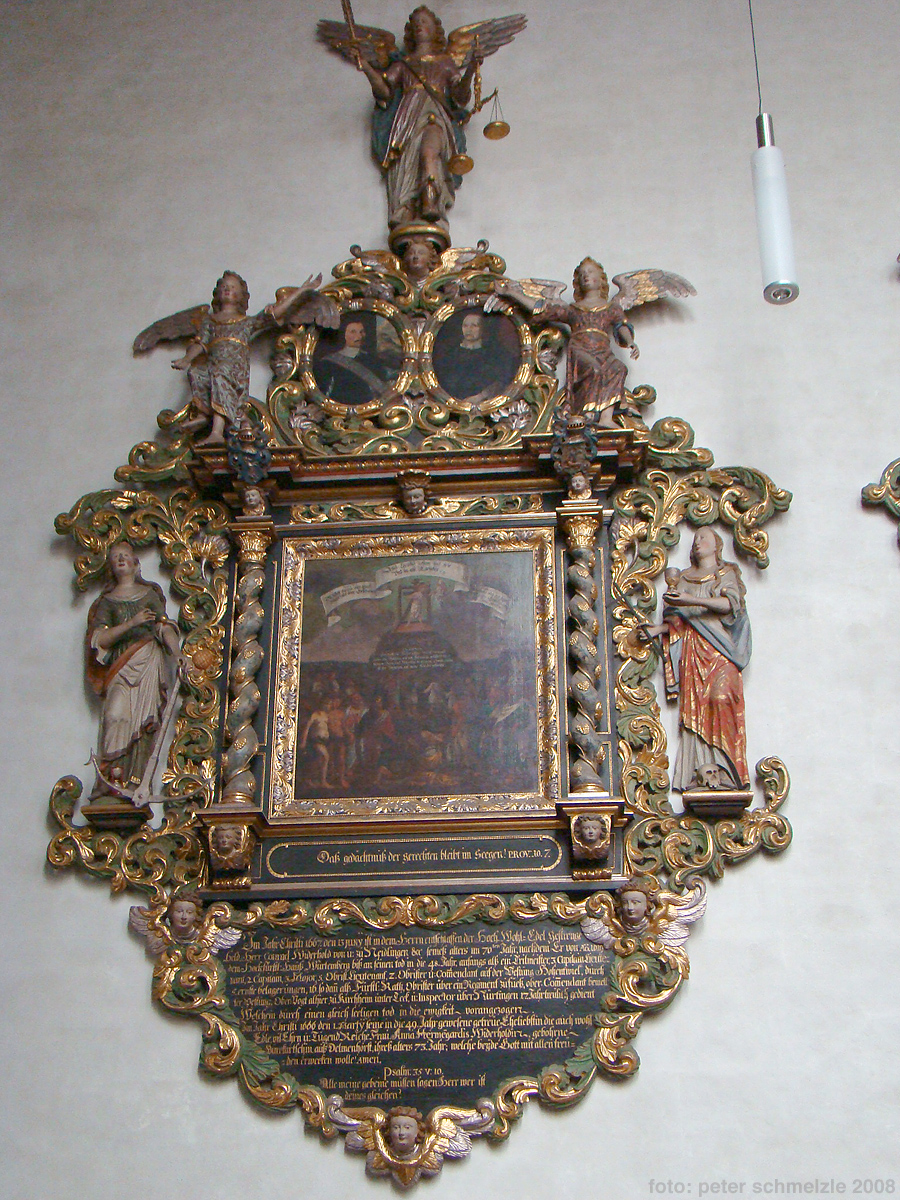 Epitaph für Konrad Widerholt und Gemahlin in der Martinskirche in Kirchheim unter Teck